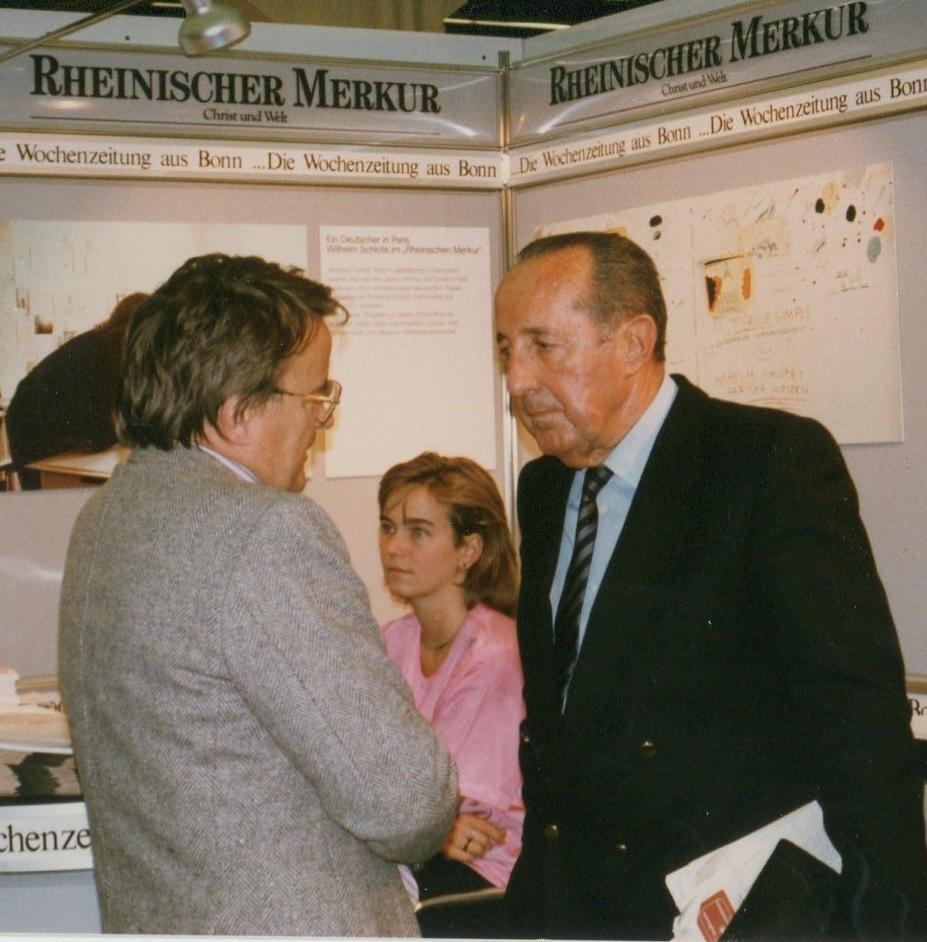 Peter Scholl-Latour, Journalist Schriftsteller, zu Besuch auf der Frankfurter Buchmesse 1988